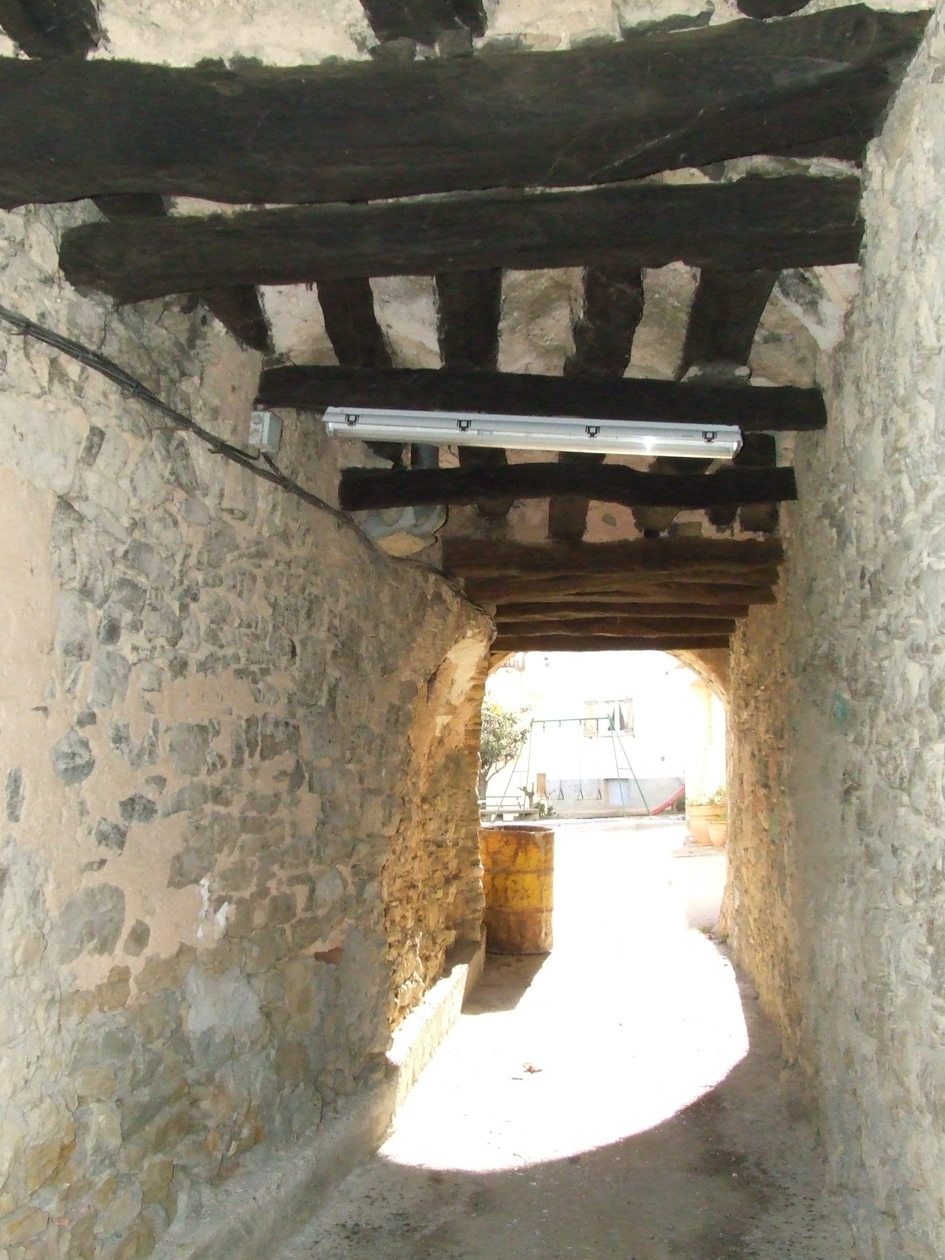 Un dels passos d'accés a l'interior del poble clos